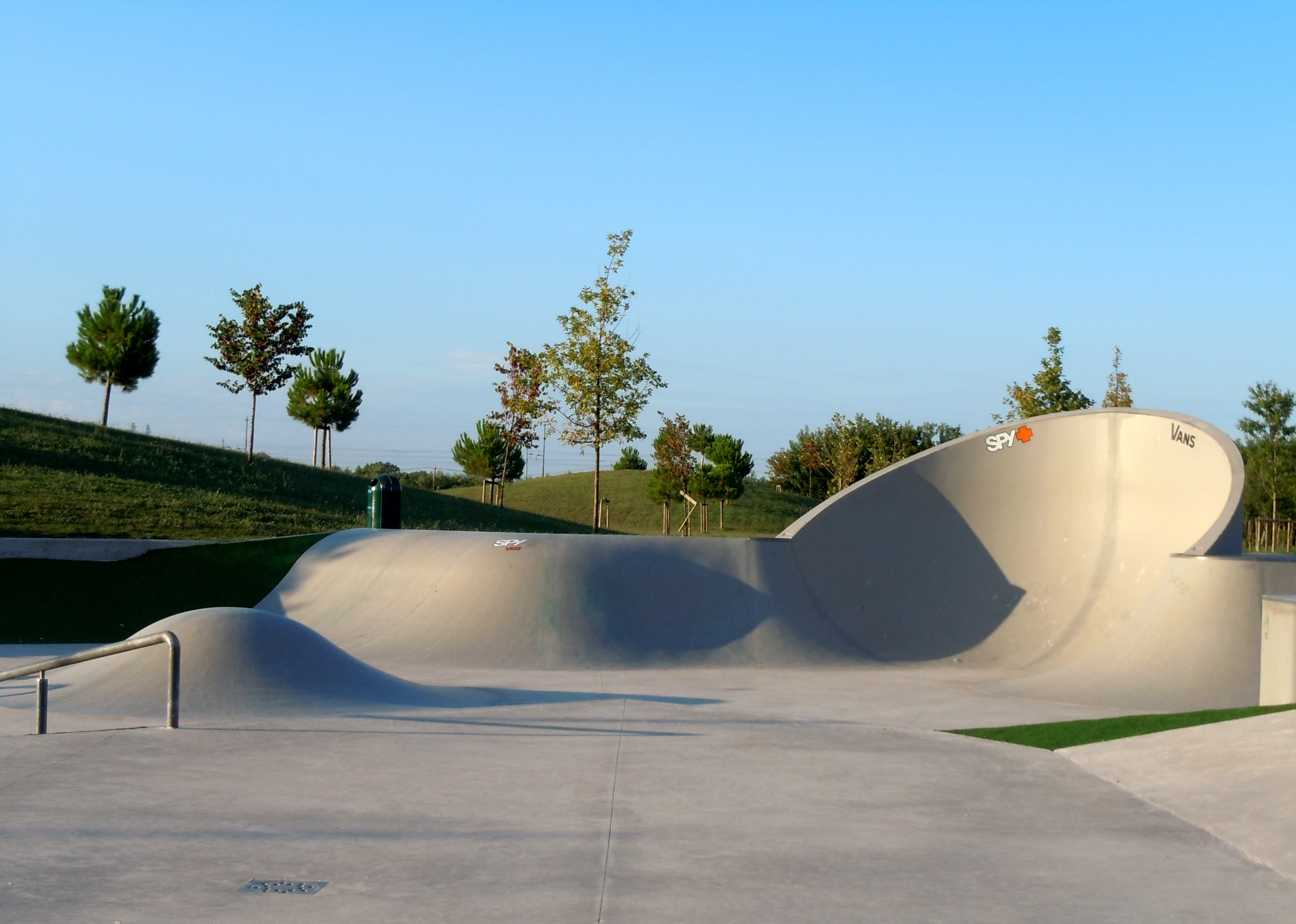 Cesena (FC, Italy): Parco Urbano dell'Ippodromo - Skate Park